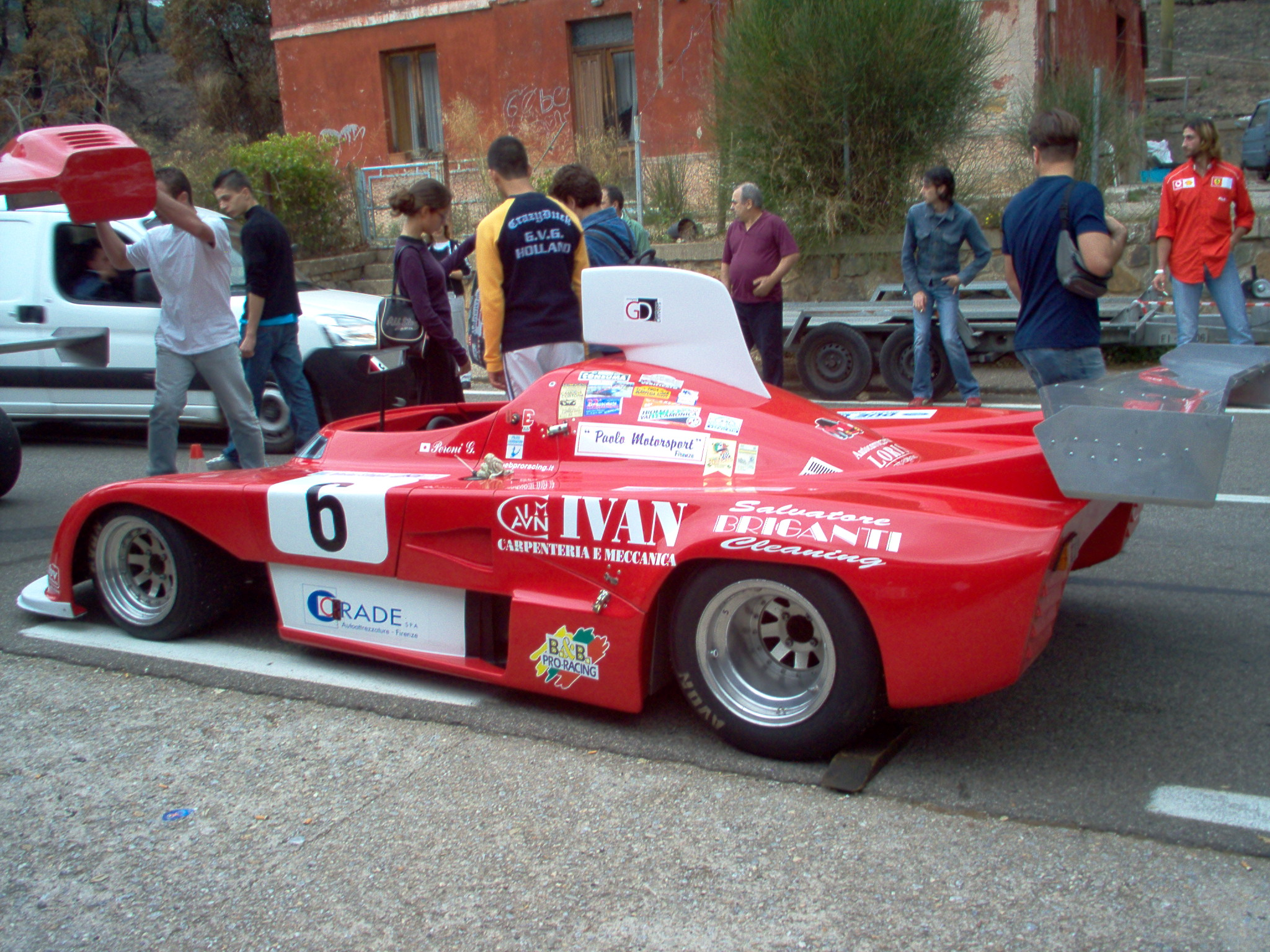 Osella PA3-BMW di Giuliano Peroni, cronoscalata "Iglesias-Sant'Angelo", 2004